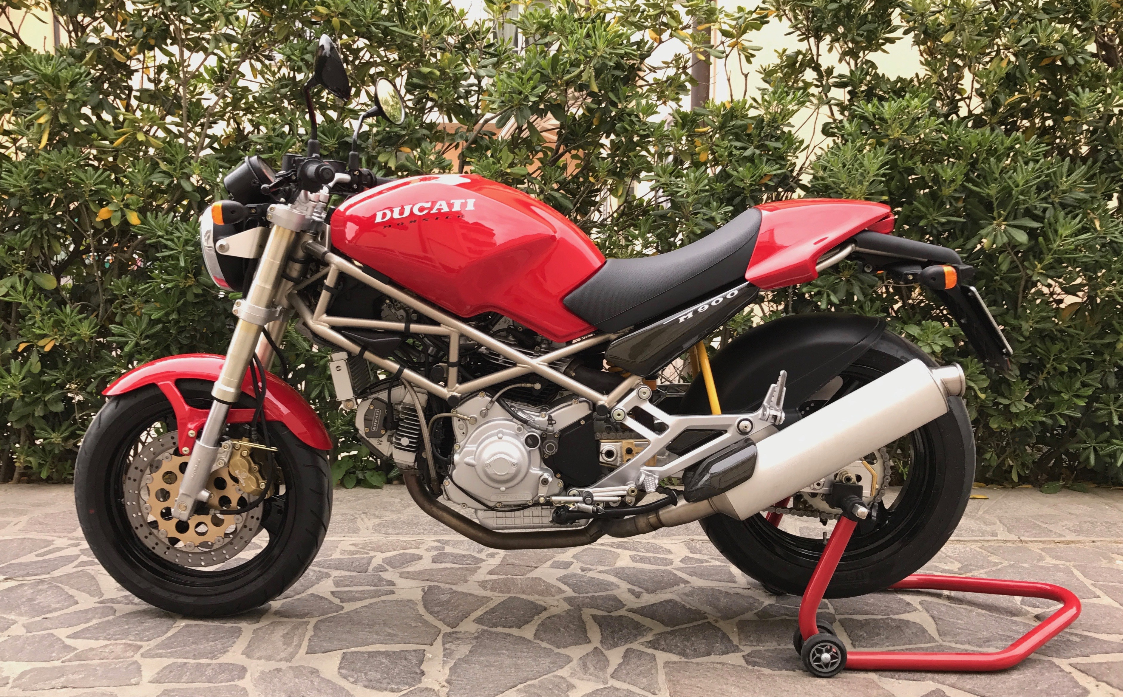 Ducati Monster 900 del 1993. Prima serie prodotta da Ducati nel 1993.